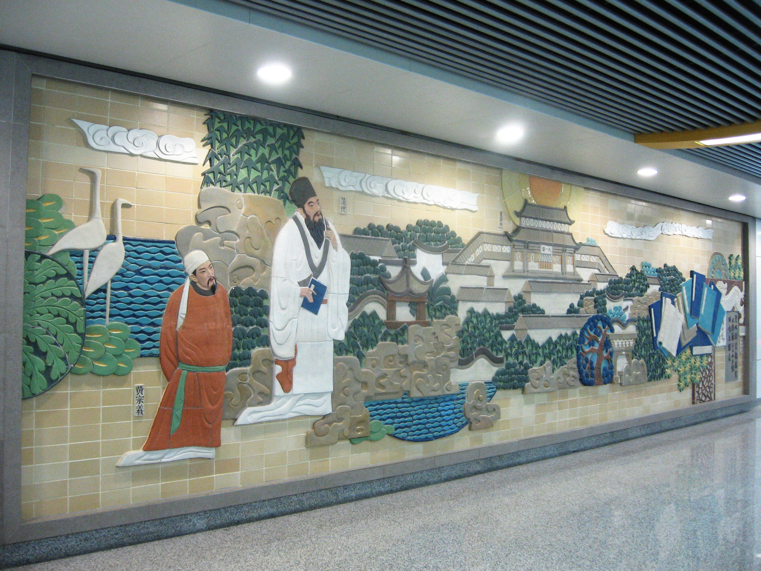 西门口站文化墙《故城书韵》